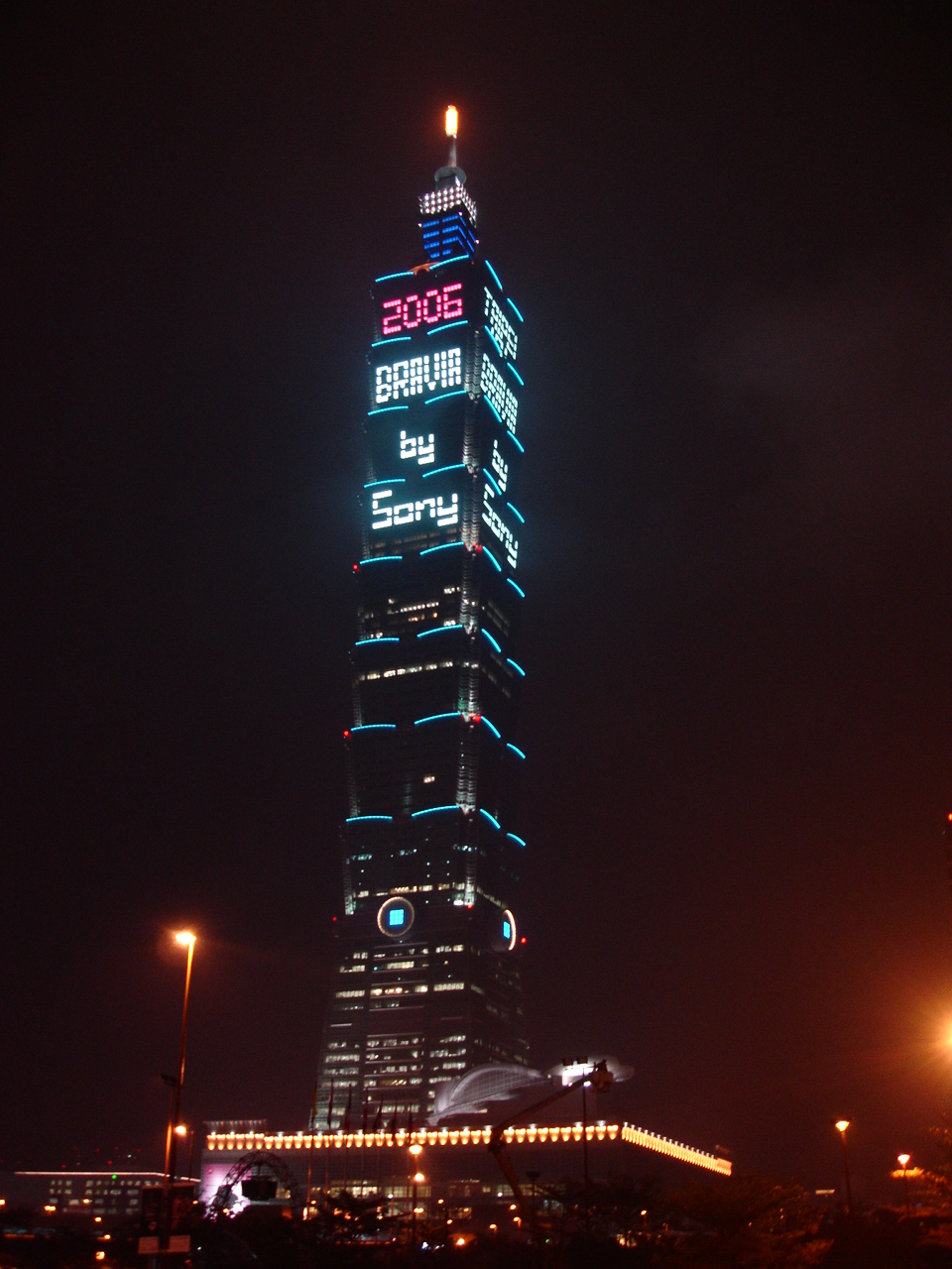 台北101-2006跨年倒數，攝於2006年01月 --RING 14:32 2006年1月6日 (UTC)